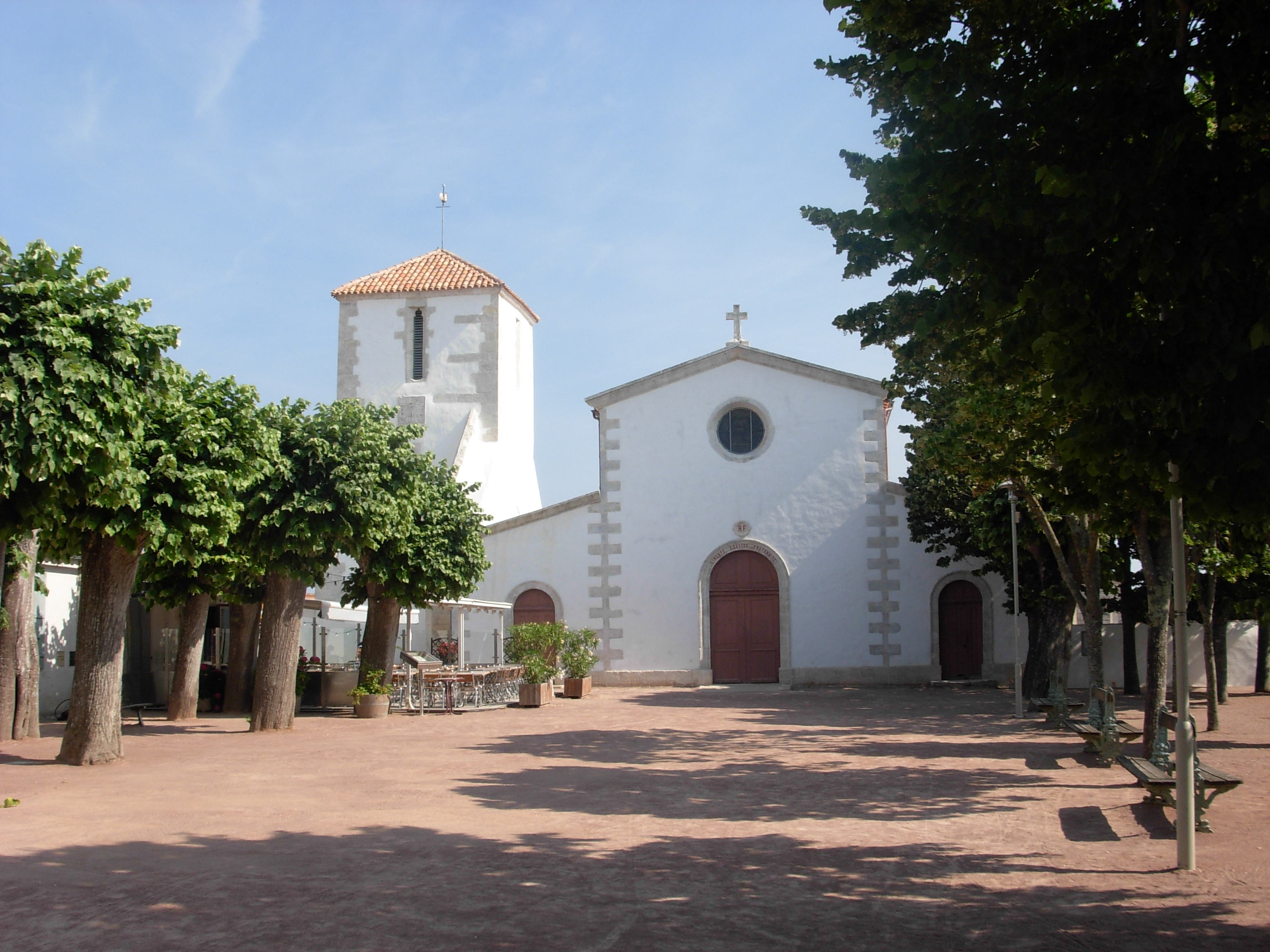 L’église Sainte Catherine, blottie dans un écrin de tilleuls se détache sur un sol aux nuances rouges foulé par les boulistes. Fondée au XIIIeme siècle par l’abbaye de Saint-Michel en l’Herm, elle sera agrandie, embellie et dotée d’un clocher au XVe siècle puis reconstruite en 1830. La séparation de l’Église et de l’État en 1905 est gravée sur le fronton sous la forme de l’estampille liberté, égalité, fraternité. En 2008 l’église a fait l’objet d’importants travaux de restauration en partenariat avec la Fondation du Patrimoine.